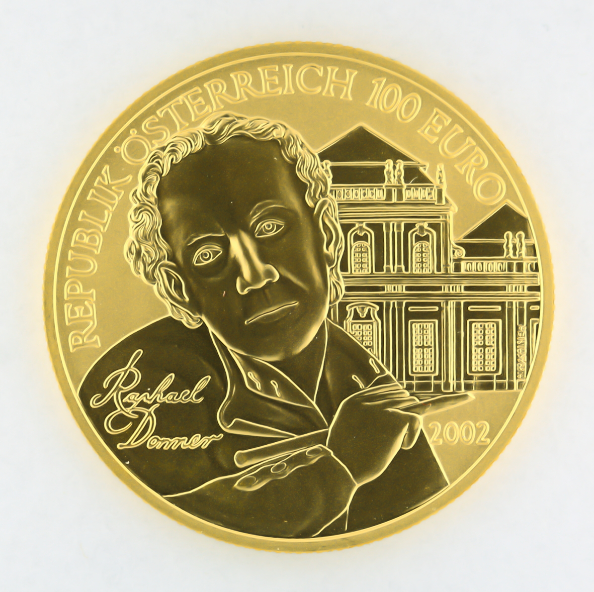 Erste 100 Euro Sammler- bzw. Gedenkmünze Österreichs. Sie ist dem Barockbildhauer Georg Raphael Donner (1693–1741) gewidmet. Der Avers zeigt sein Porträt vor dem Unteren Belvedere, in dem zahlreiche Werke des Künstlers sich befinden. Auf der Rückseite sind Elemente des Providentia-Brunnen am Neuen Markt in Wien dargestellt, der als Donners Hauptwerk gilt. Durchmesser: 30,00 mm; Feingewicht: 16 g; Legierung: 98,6% Gold, 1,4% Kupfer; Ausgabedatum: 13. November 2002; Auflage: 30.000 Stück.